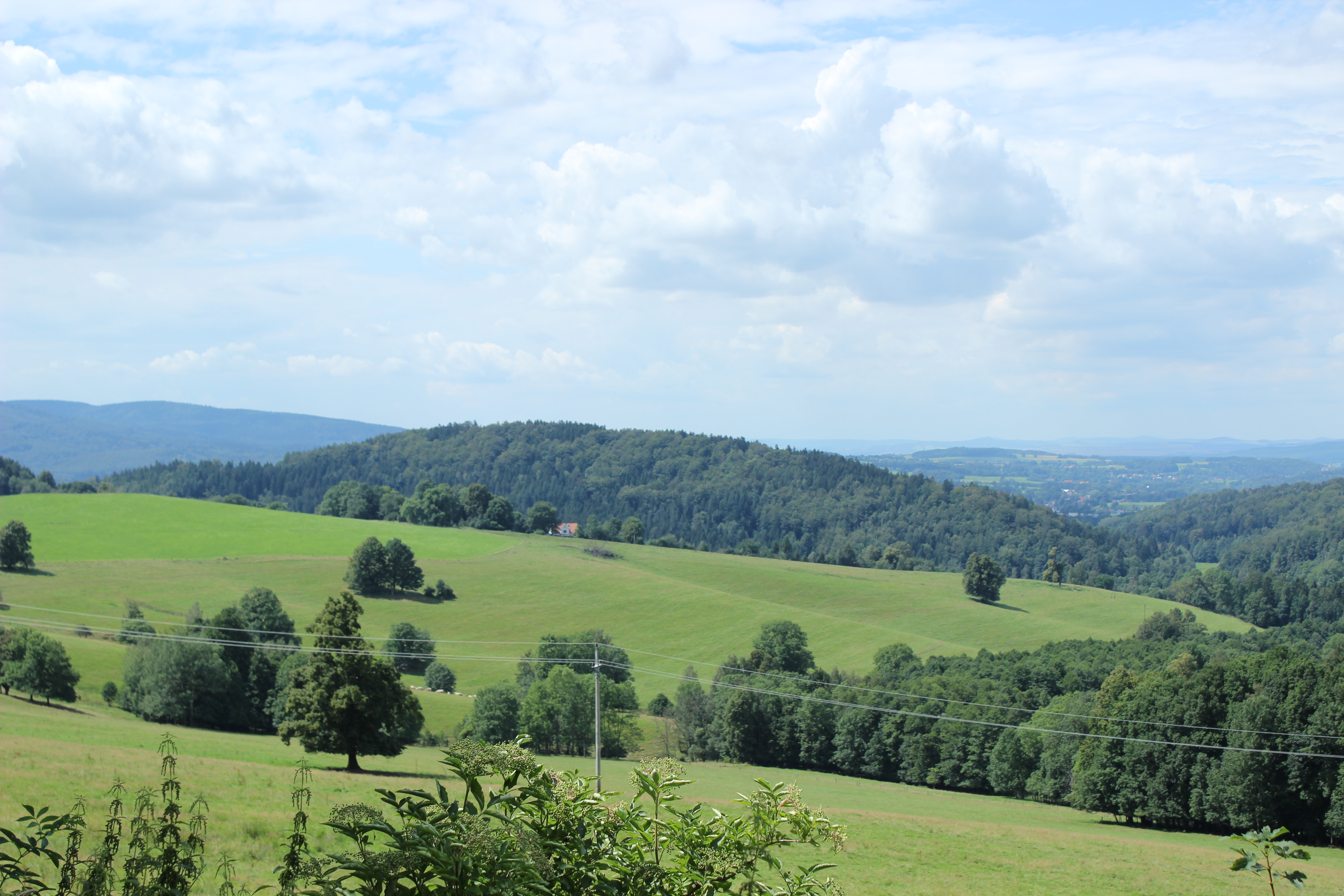 Pekelský vrch vypínající se nad Peklem, částí Raspenavy.